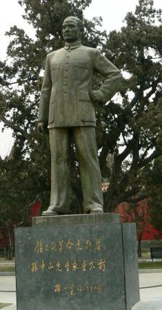 孙中山塑像